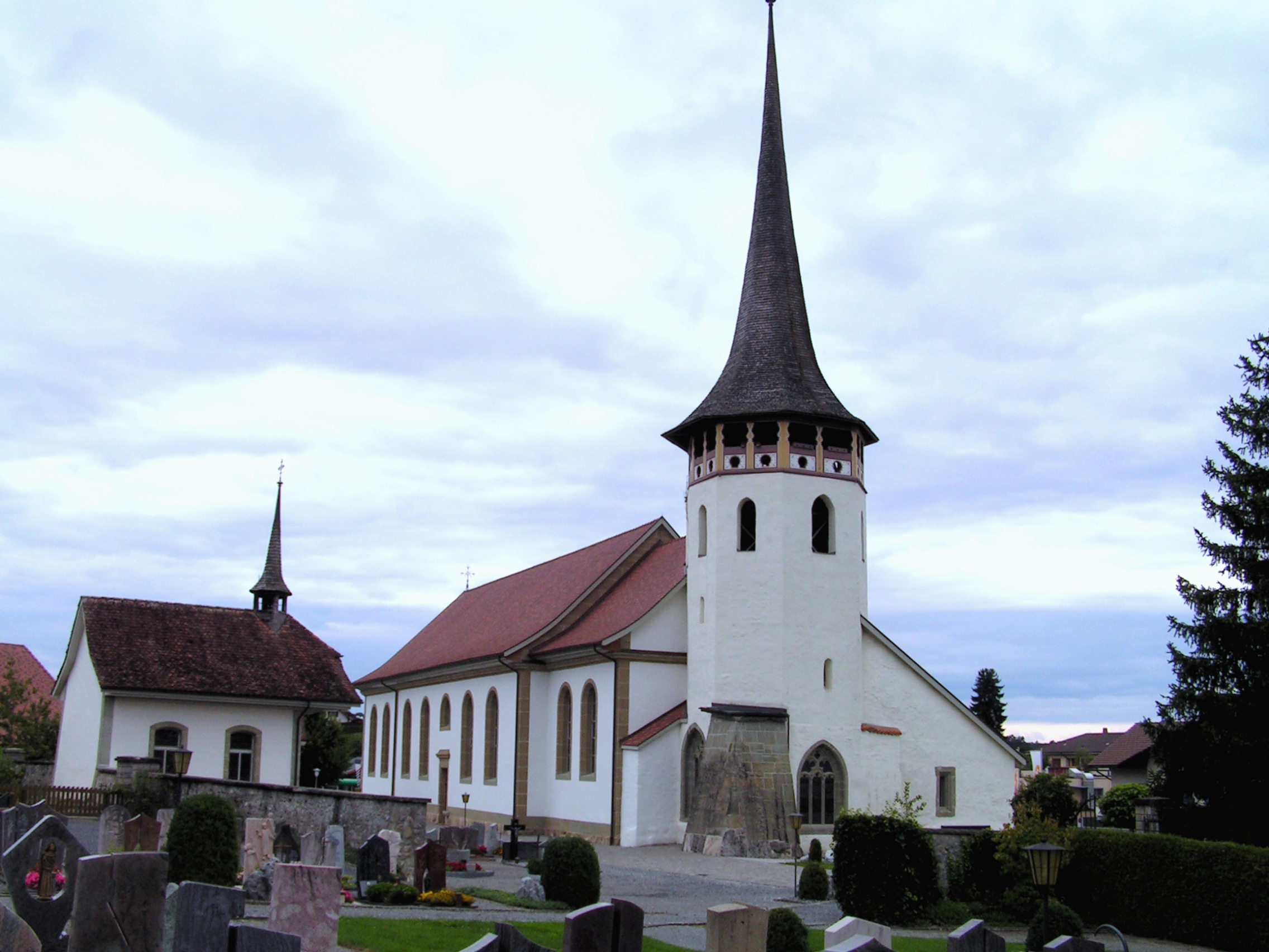 Kirchweg 3, Tafers. Église Saint-Martin.